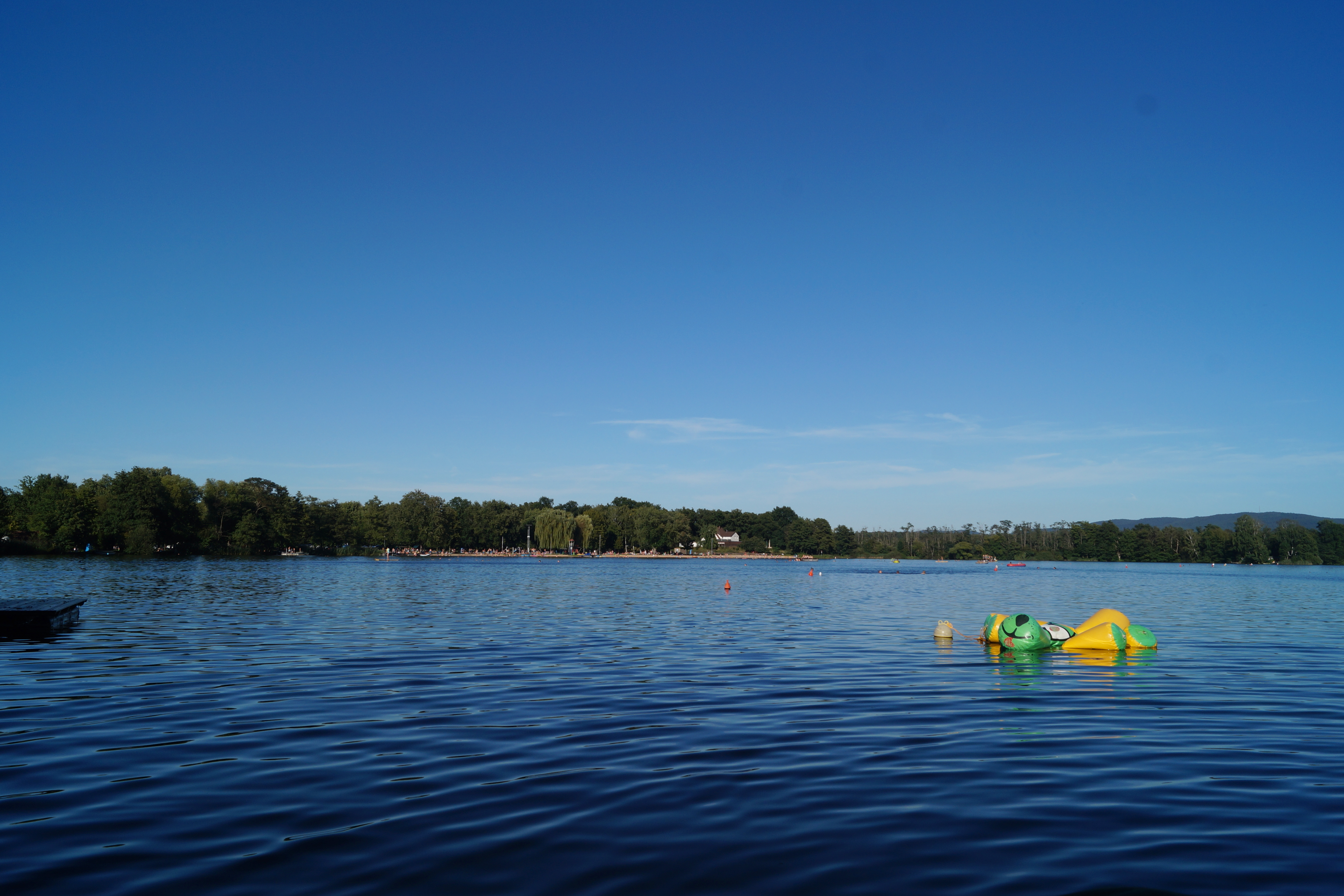 See Freigericht West/Großkrotzenburger See, Ansicht von Südwesten